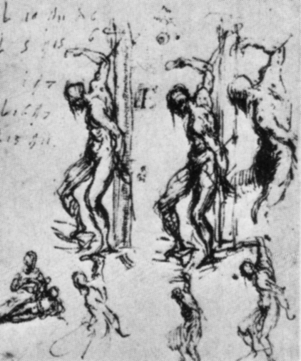 Studie für den heiligen Sebastian des Hochaltars, Zeichnung Feder und Pinsel, 16.2 x 13.6 cm